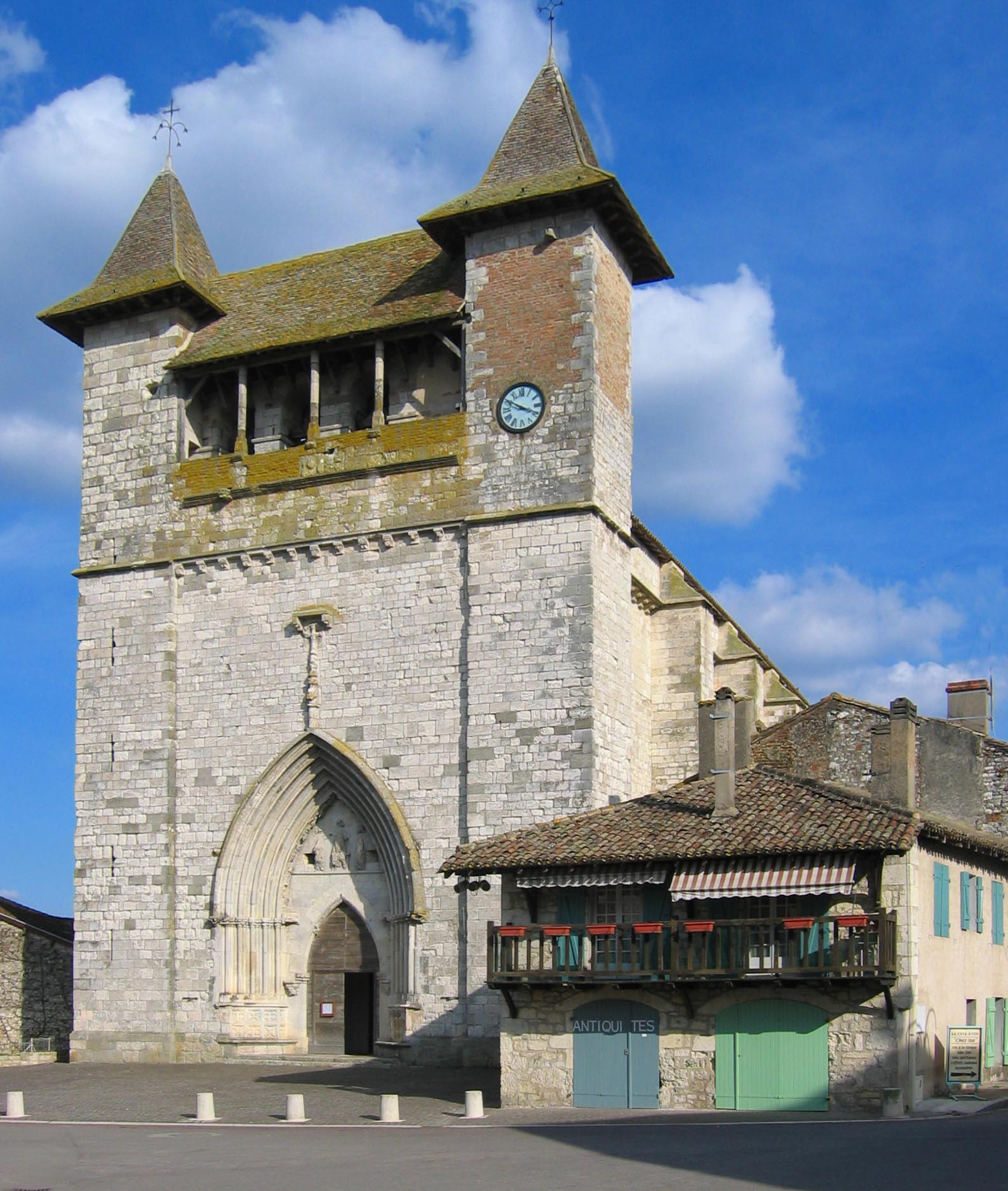 Eglise Notre Dame de Villeréal (France)